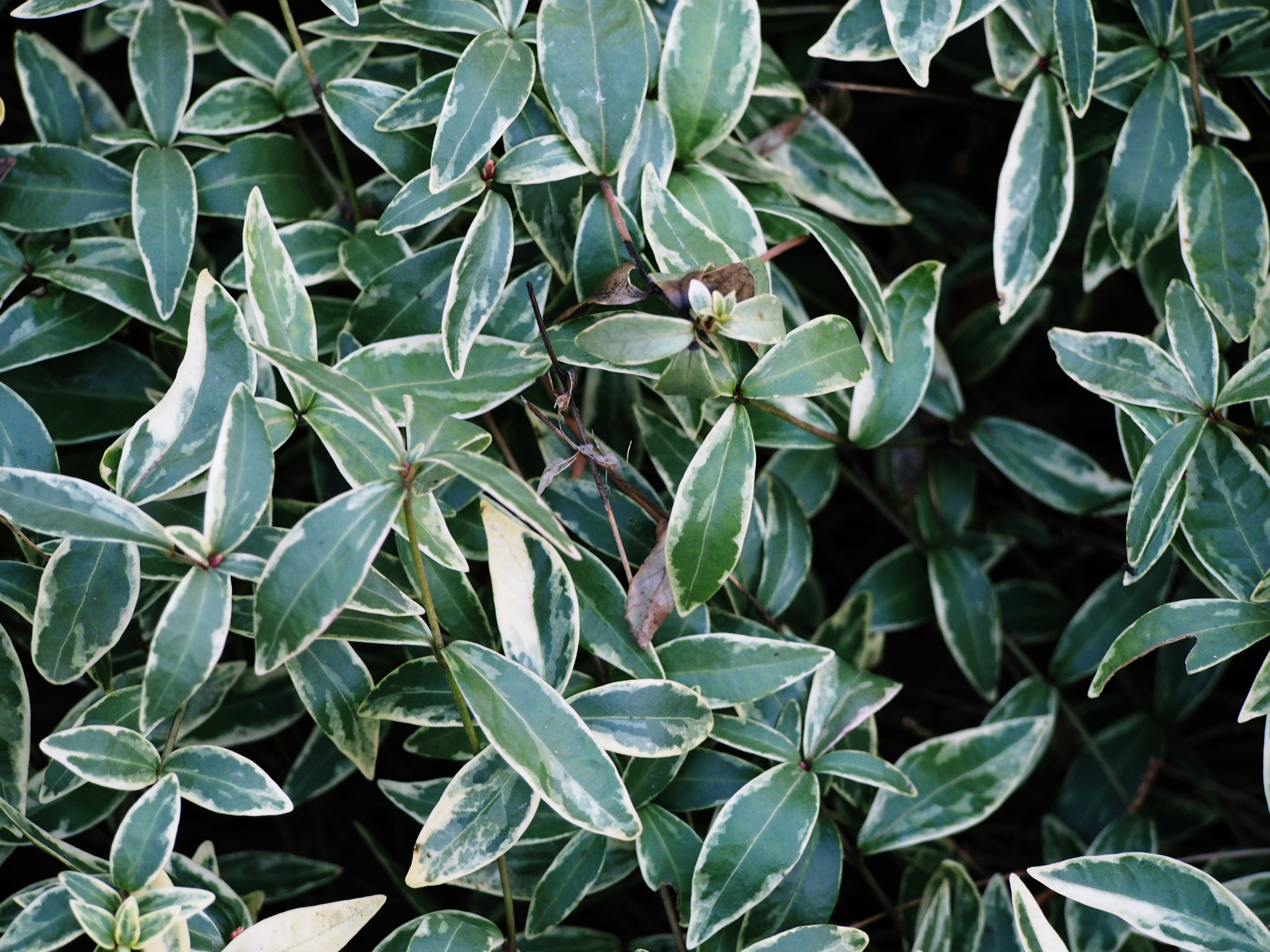 Barwinek pospolity kultywar 'Argenteovariegata' (Vinca minor 'Argenteovariegata'). Ogród Botaniczny UWr, Wrocław, Polska.